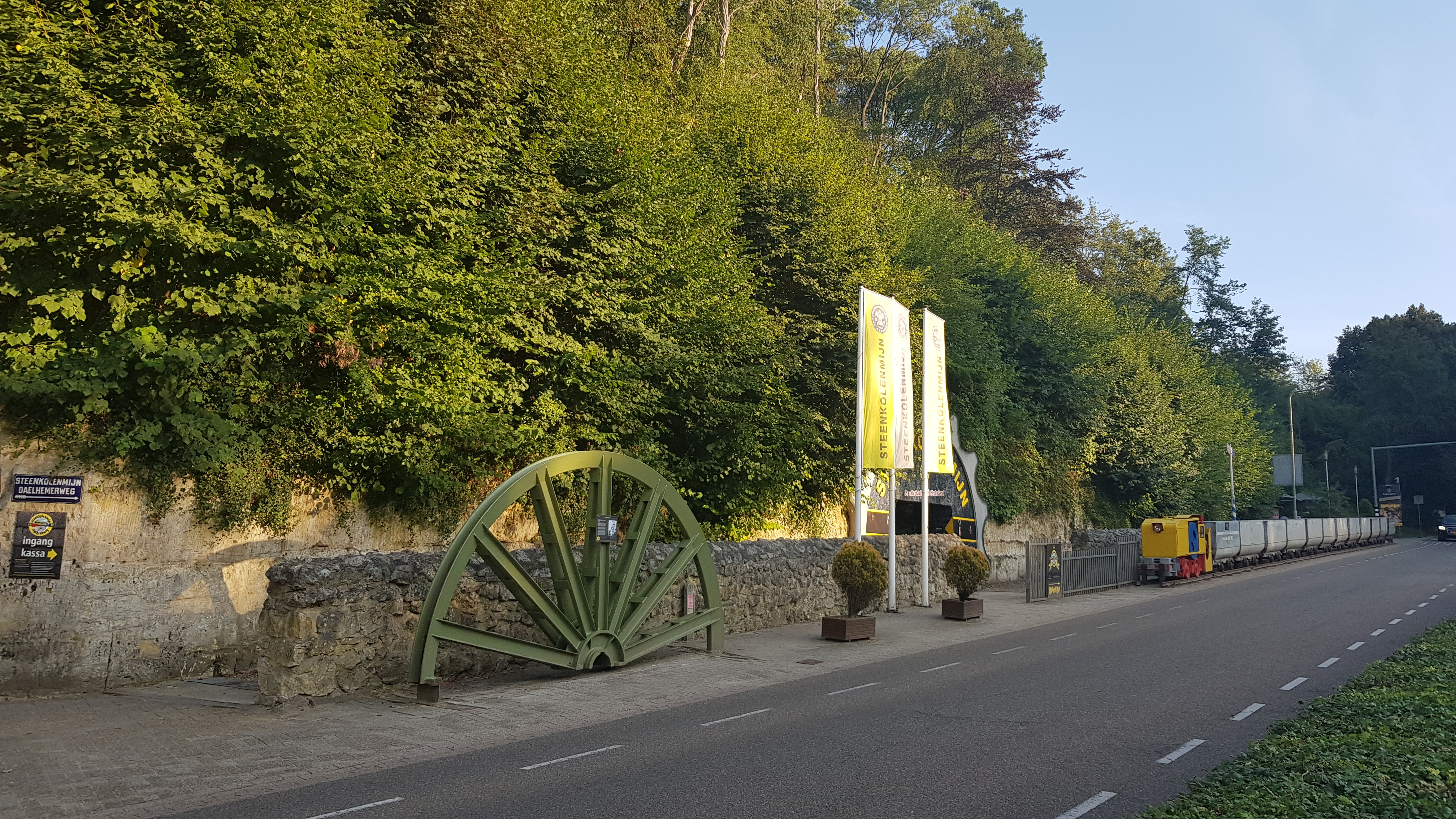 Museum Steenkolenmijn Valkenburg, Valkenburg aan de Geul, Nederland Wikidata has entry Q2445274 with data related to this item.